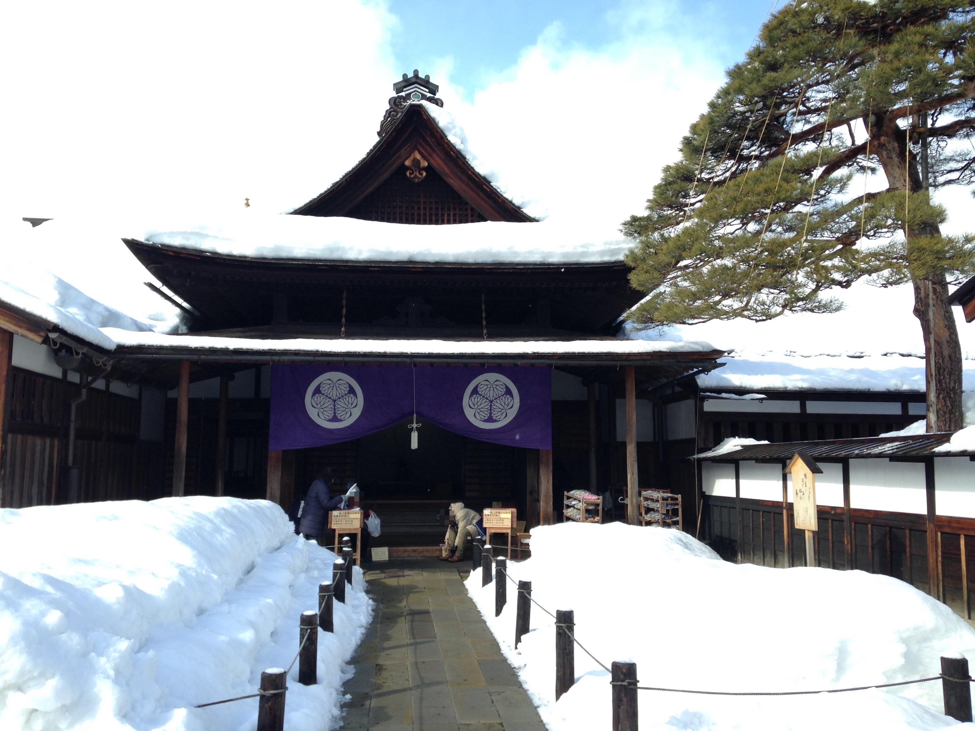 高山陣屋の玄関